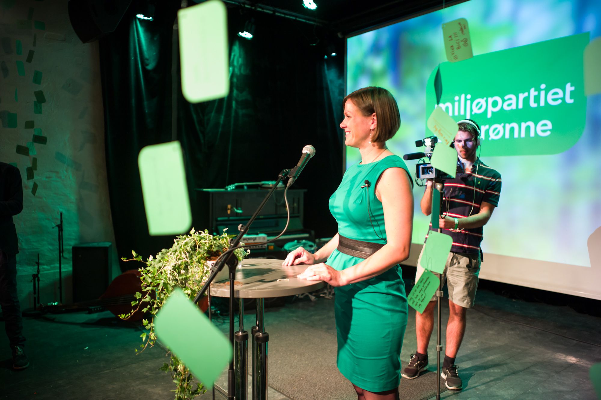 Månefisken, foto: Svein Gunnar Kjøde